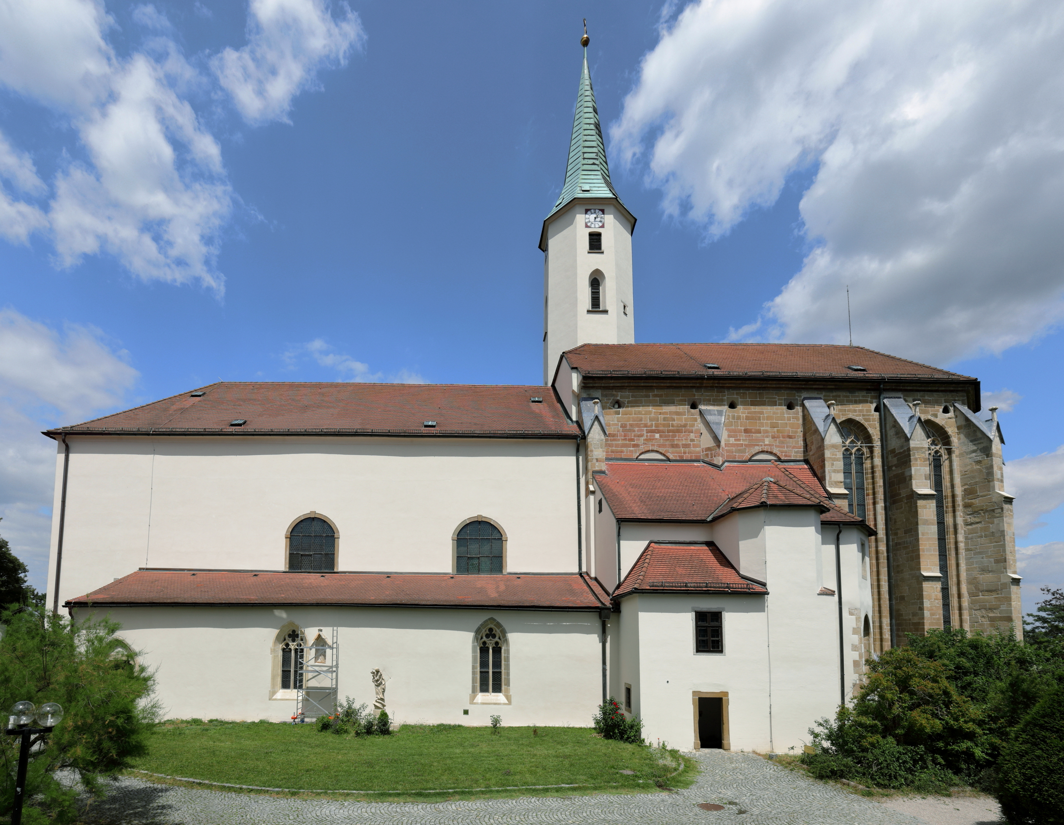 Südansicht der Martinskirche in der niederösterreichischen Stadt Klosterneuburg.